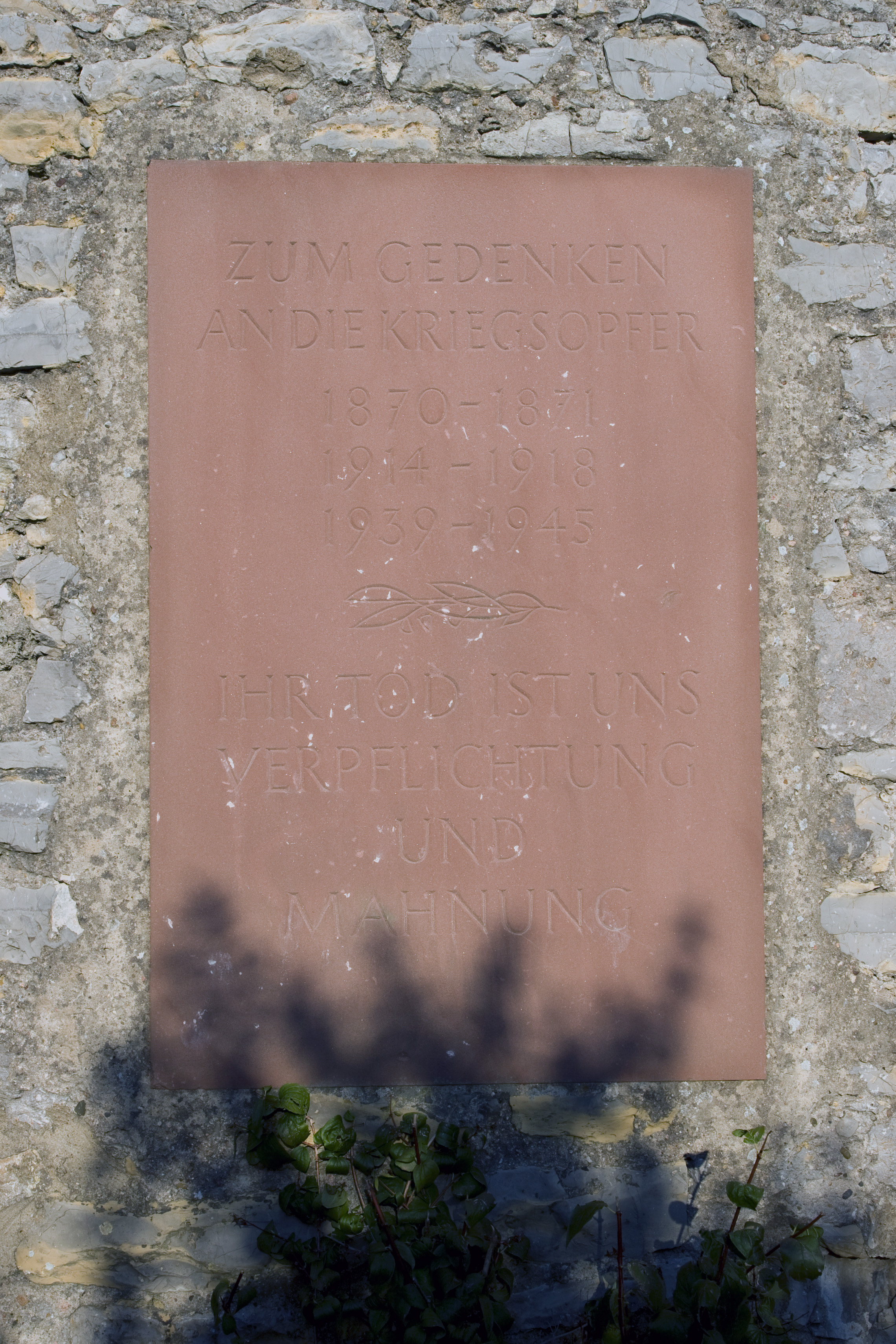 Tafel am Wartturm im badischen Weingarten, zum Gedenken an die Opfer der drei letzten großen Kriege.